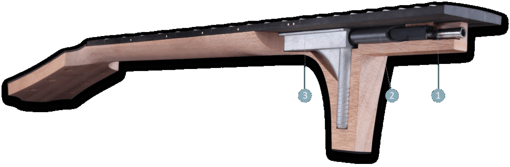 Furch CNR